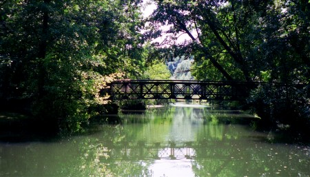 Description: La passerelle Antoine Polonceau sur l'Yerres à Boussy-Saint-Antoine (Essonne)Source: Utilisateur:vinbaronLicence